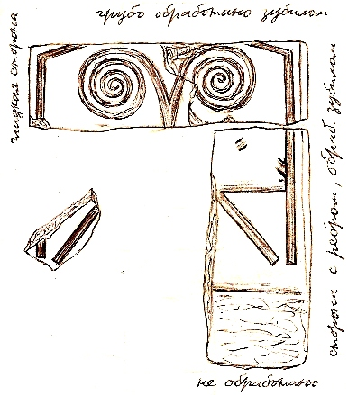 Реконструкция резной известняковой плиты из кургана под Новосвободной, Адыгея.